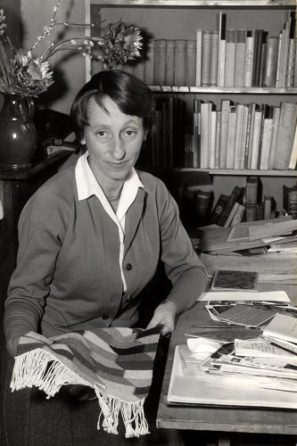 De kunstenares mej. G. van Waterschoot van der Gracht (opdracht Maasbode) Datum: 3 september 1957